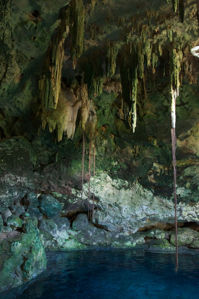 Cenote Chan Sinicché en Cuzamá Yucatán México. (2 de tres cenotes en Cuzamá)